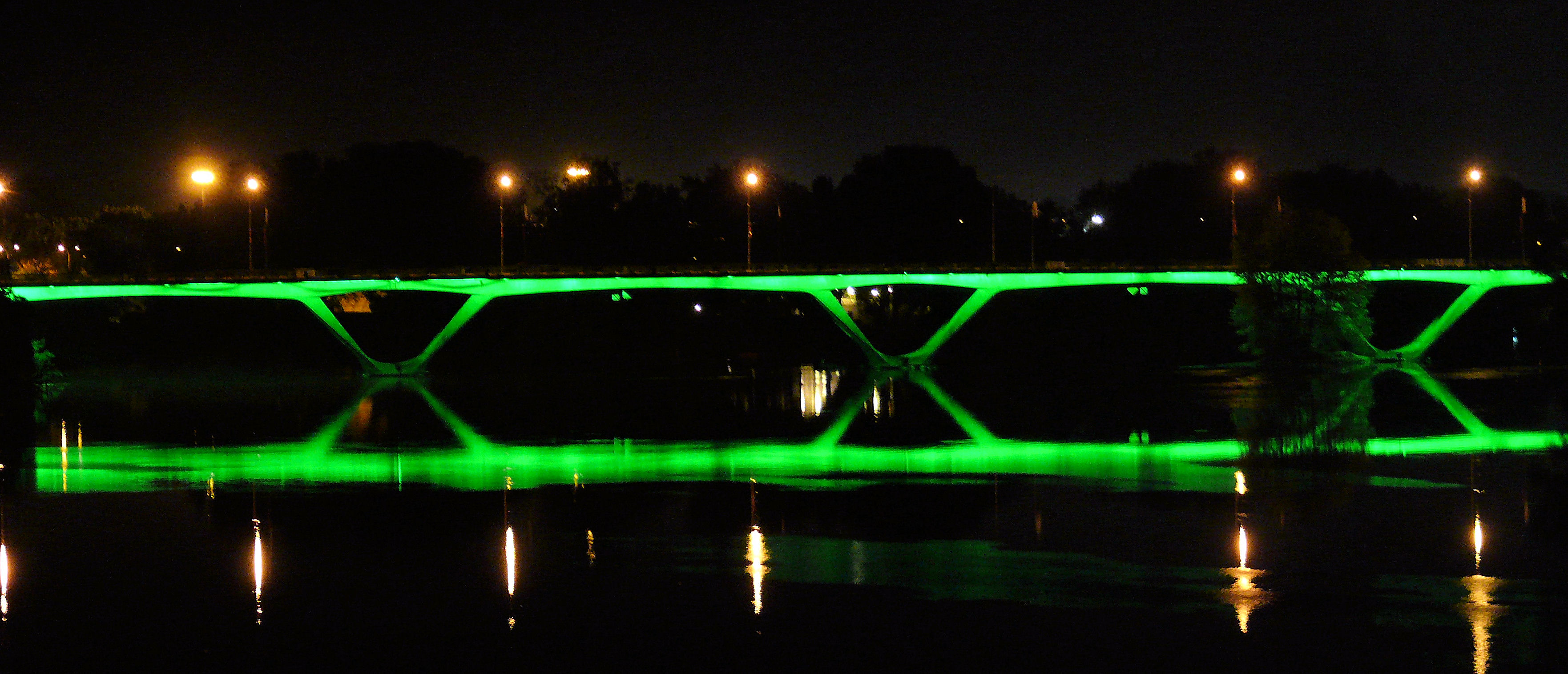 Toulouse (Haute-Garonne, France) - Le pont Saint-Michel de nuit.